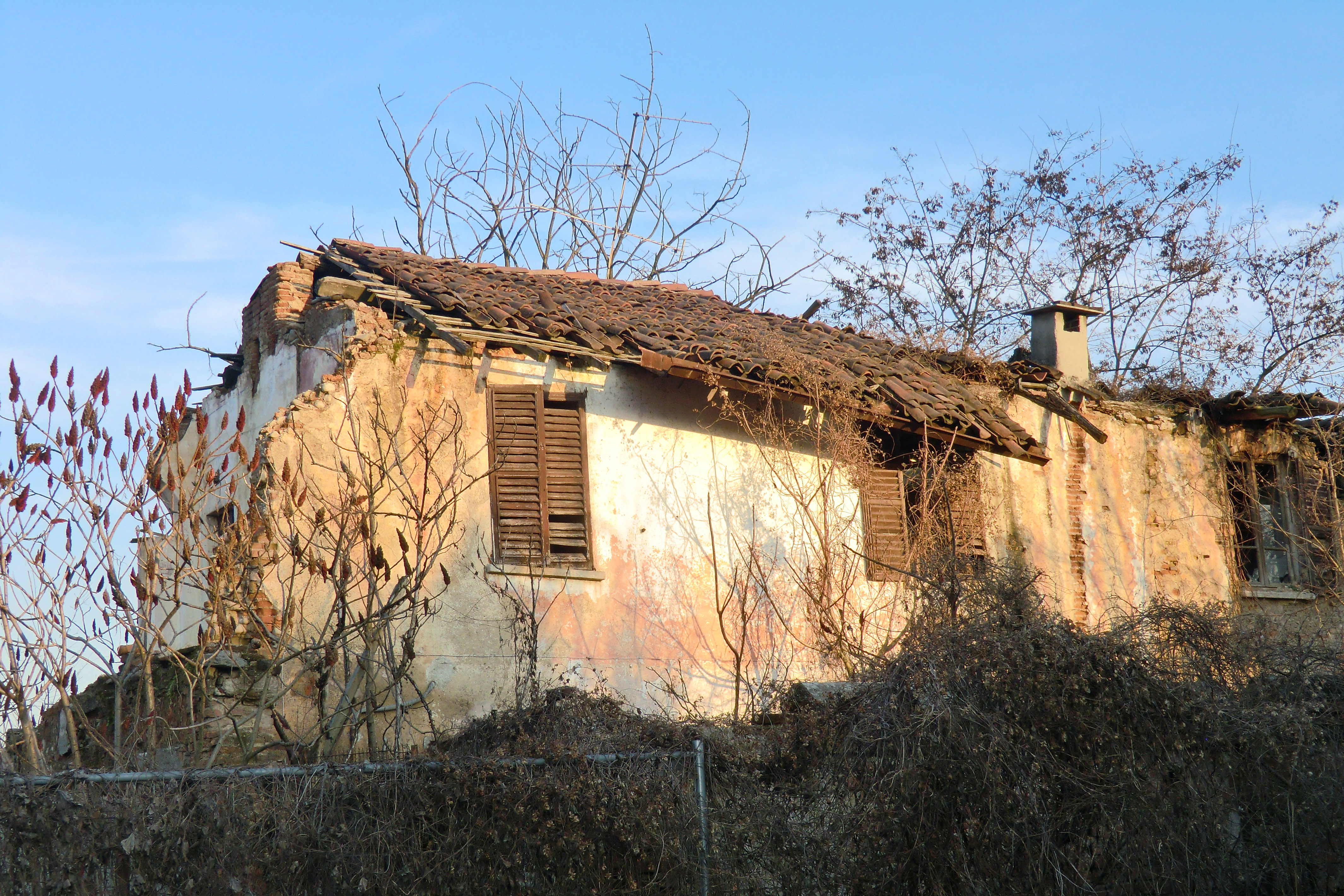 Cascina Malavita This is a photo of a monument which is part of cultural heritage of Italy.